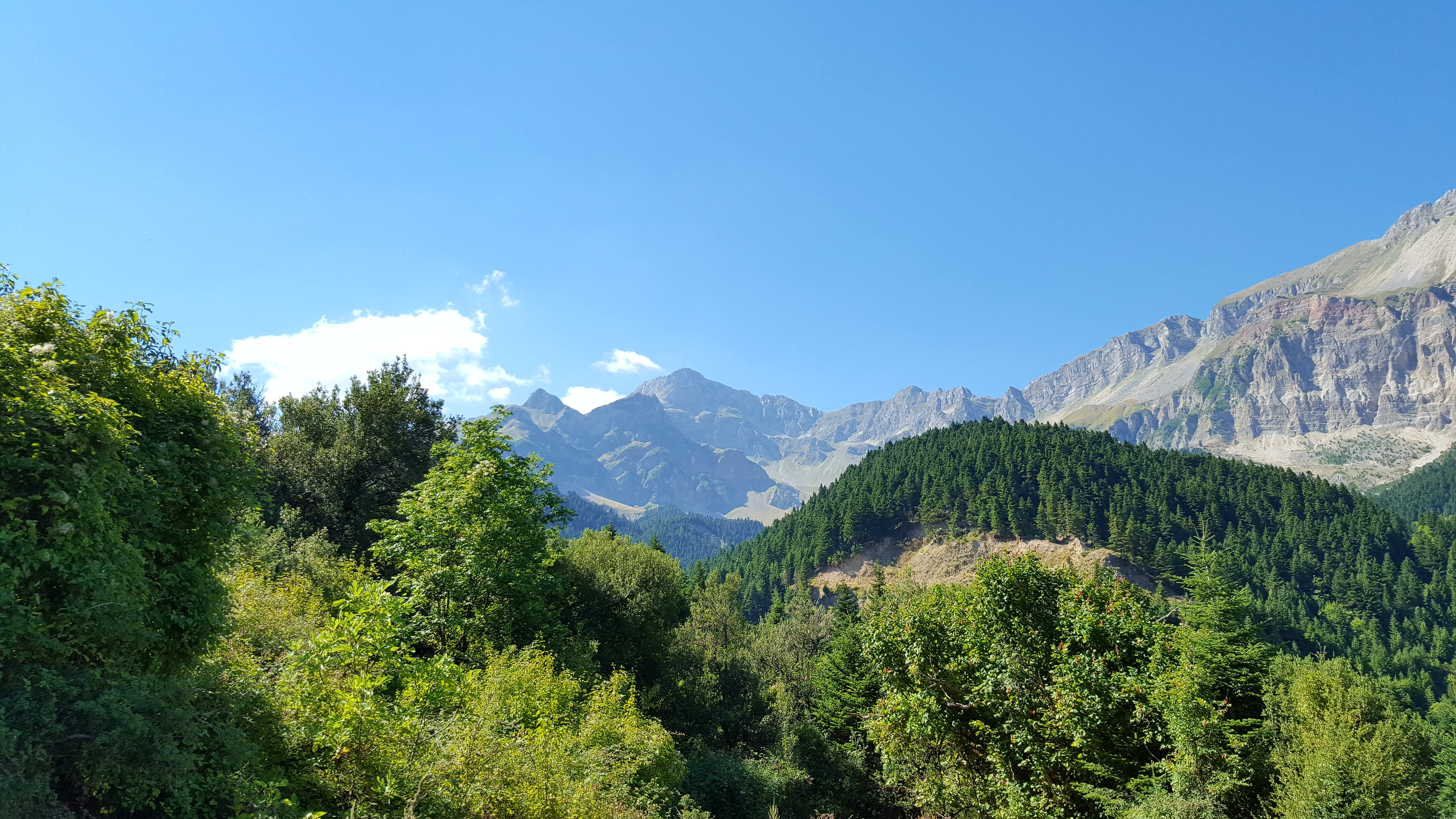 Τα Τζουμέρκα όπως φαίνονται από το χωριό Μελισσουργοί